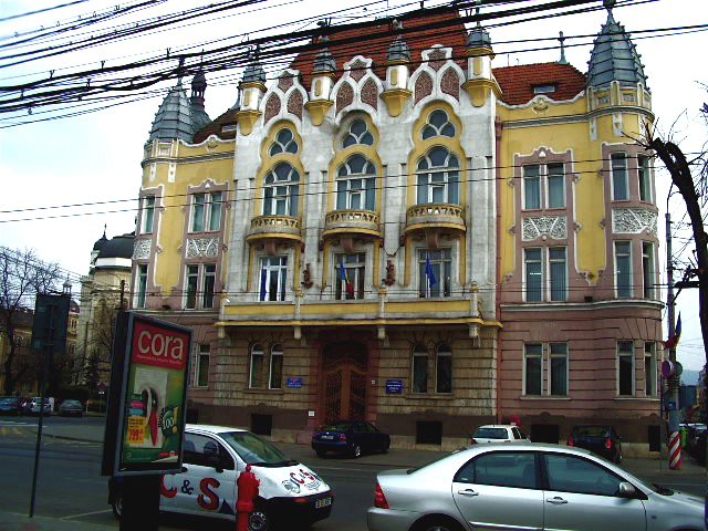 Cluj-Napoca, Prefectura, Bulev. 21 Decembrie 1989 nr.58